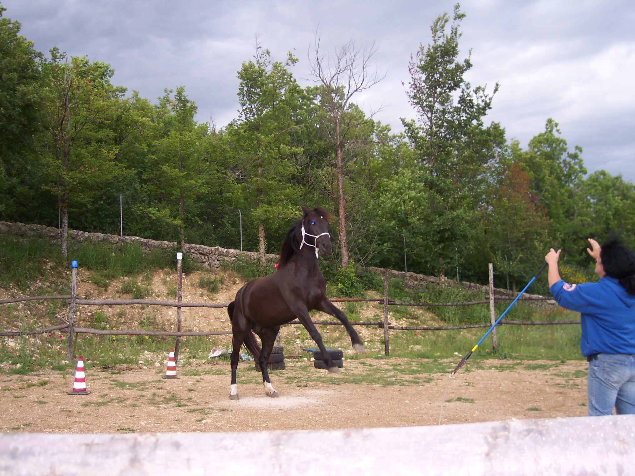 Esercizi di addestramento in libertà